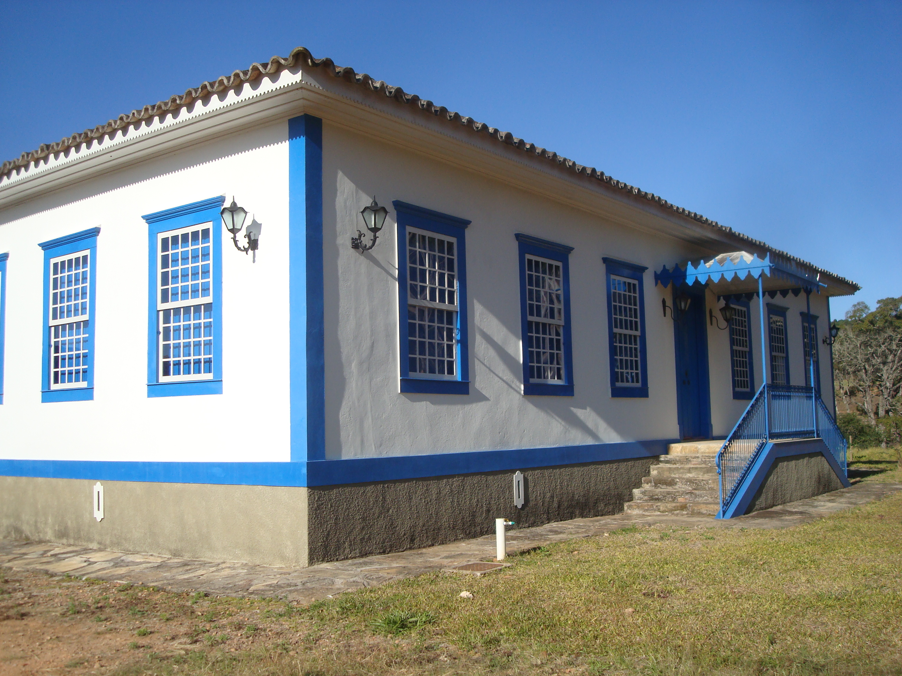 Palco da maior Revolta de Escravos do sudeste, a Revolta de Carrancas, que acabou com o assassinato de alguns membros da Família Junqueira.